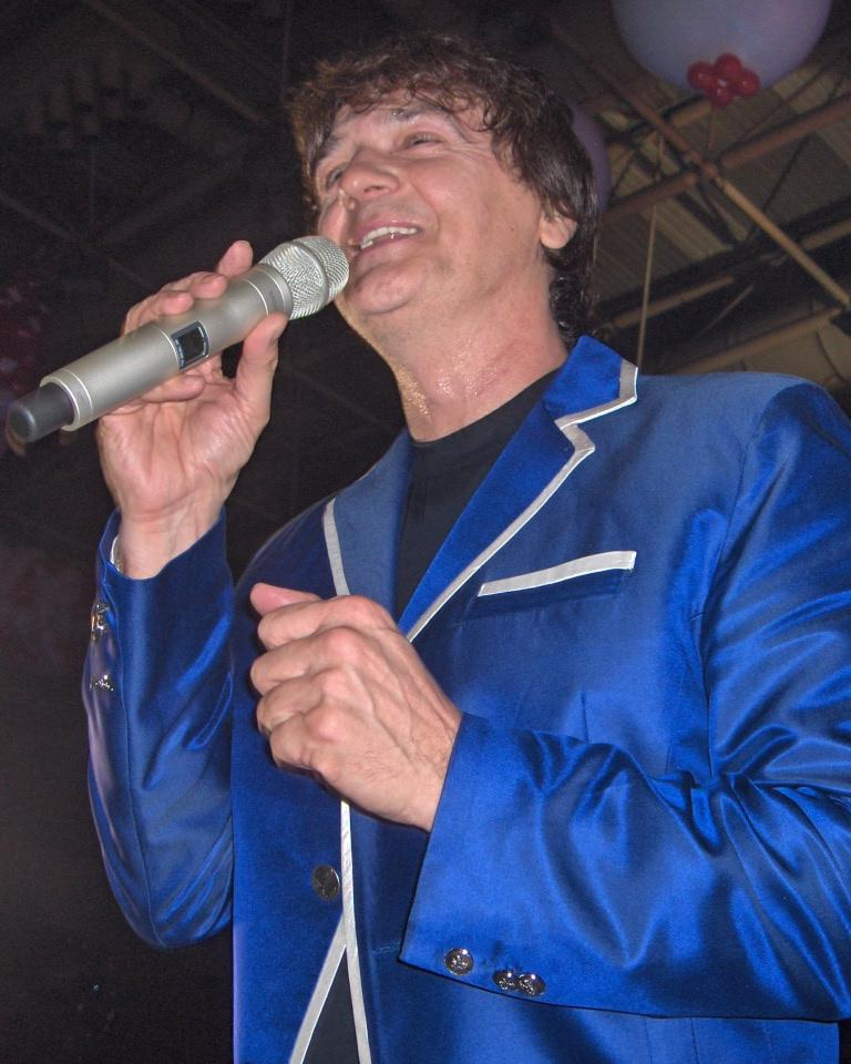 Zdravko Čolić